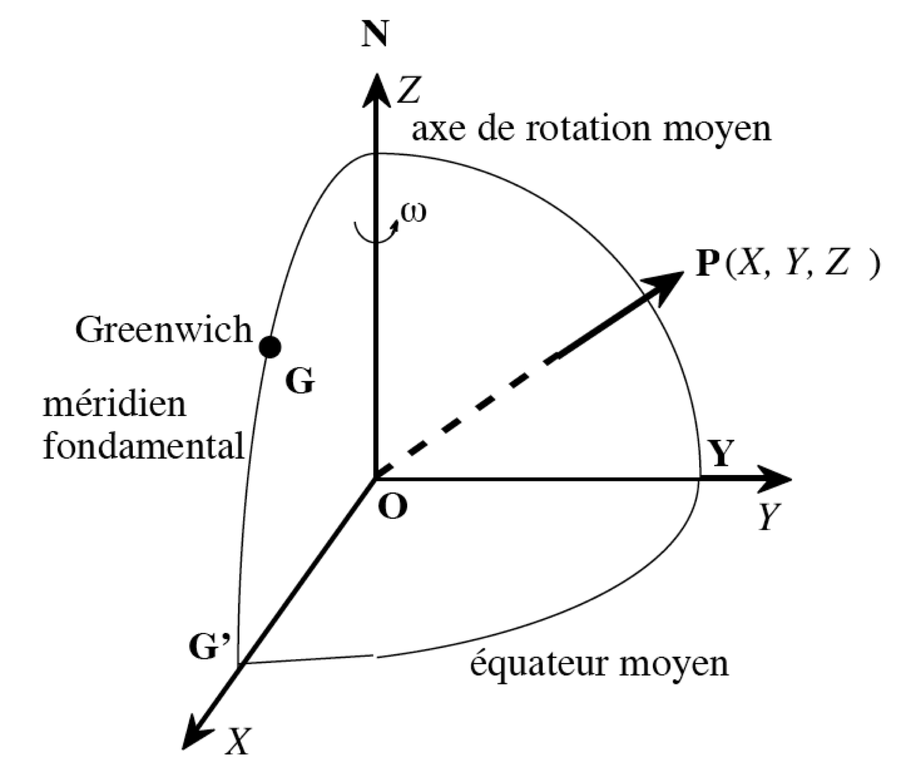 Système de référence fondamental figé dans la Terre (CTS). Le graphique a été réalisé par l'auteur qui le met dans le domaine public. Utilisateur:Carlo denis.